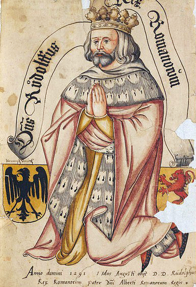 Fürstenbildnisse der Habsburger des 14. Jh. nach den Glasfenstern von Königsfelden/Aargau - BSB Cod.icon. 330 [S.l.] Nordschweiz (Bern ?) um 1560 fol. 02r: Rudolf I., römisch-deutscher König